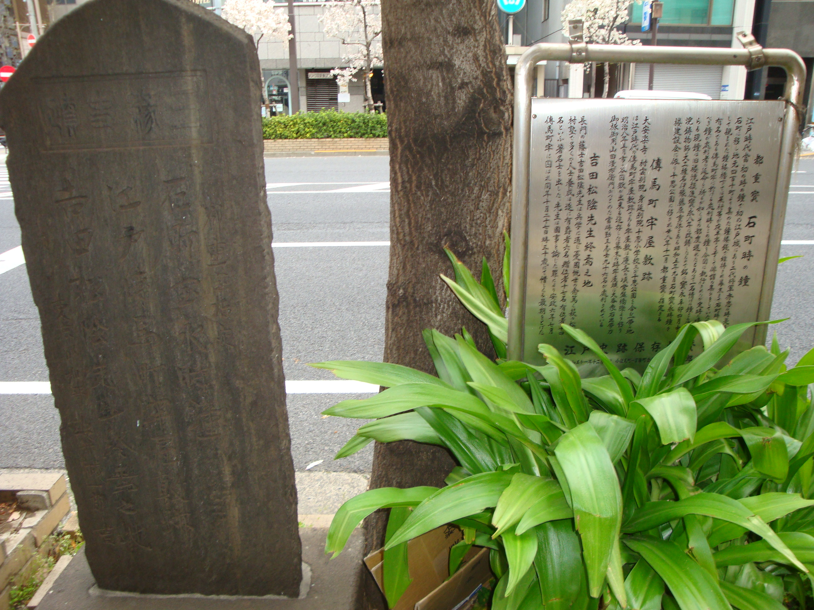 石町時の鐘の説明書き